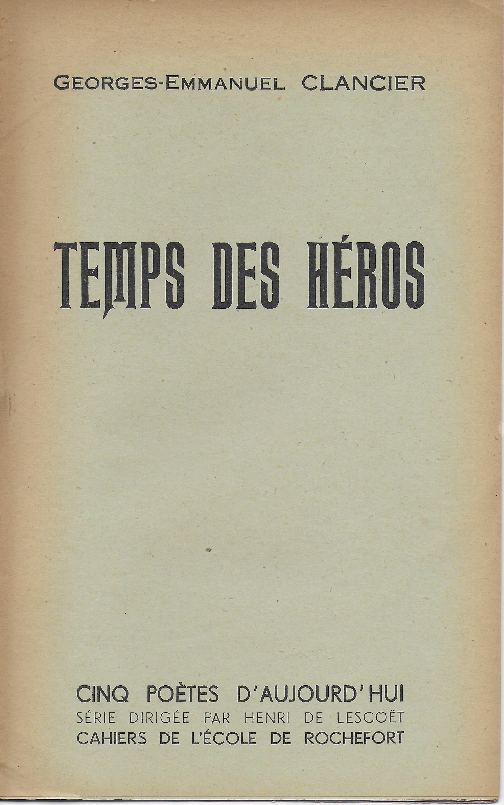 1er recueil de poèmes de Georges-Emmanuel Clancier, écrits avant 1939, publiés en 1943